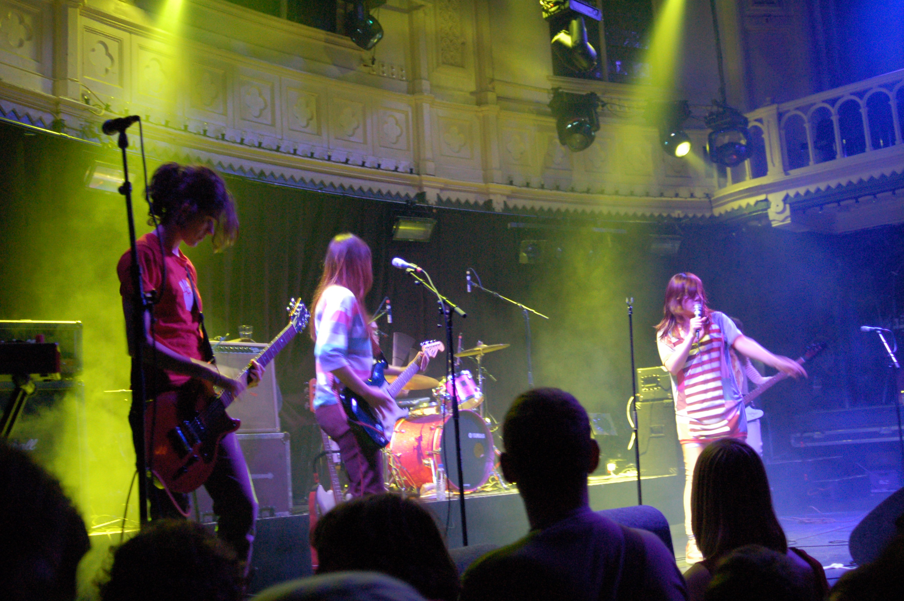 Cansei de Ser Sexy - Paradiso, Amsterdam 20.11.06